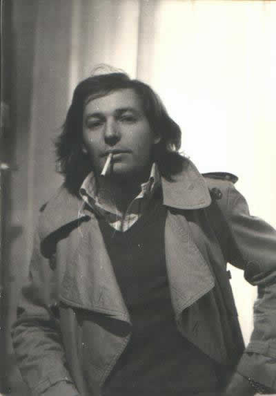 Foto scattata a Vasco Rossi ai tempi di Punto Radio